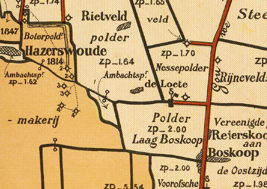 Ambachtspolder